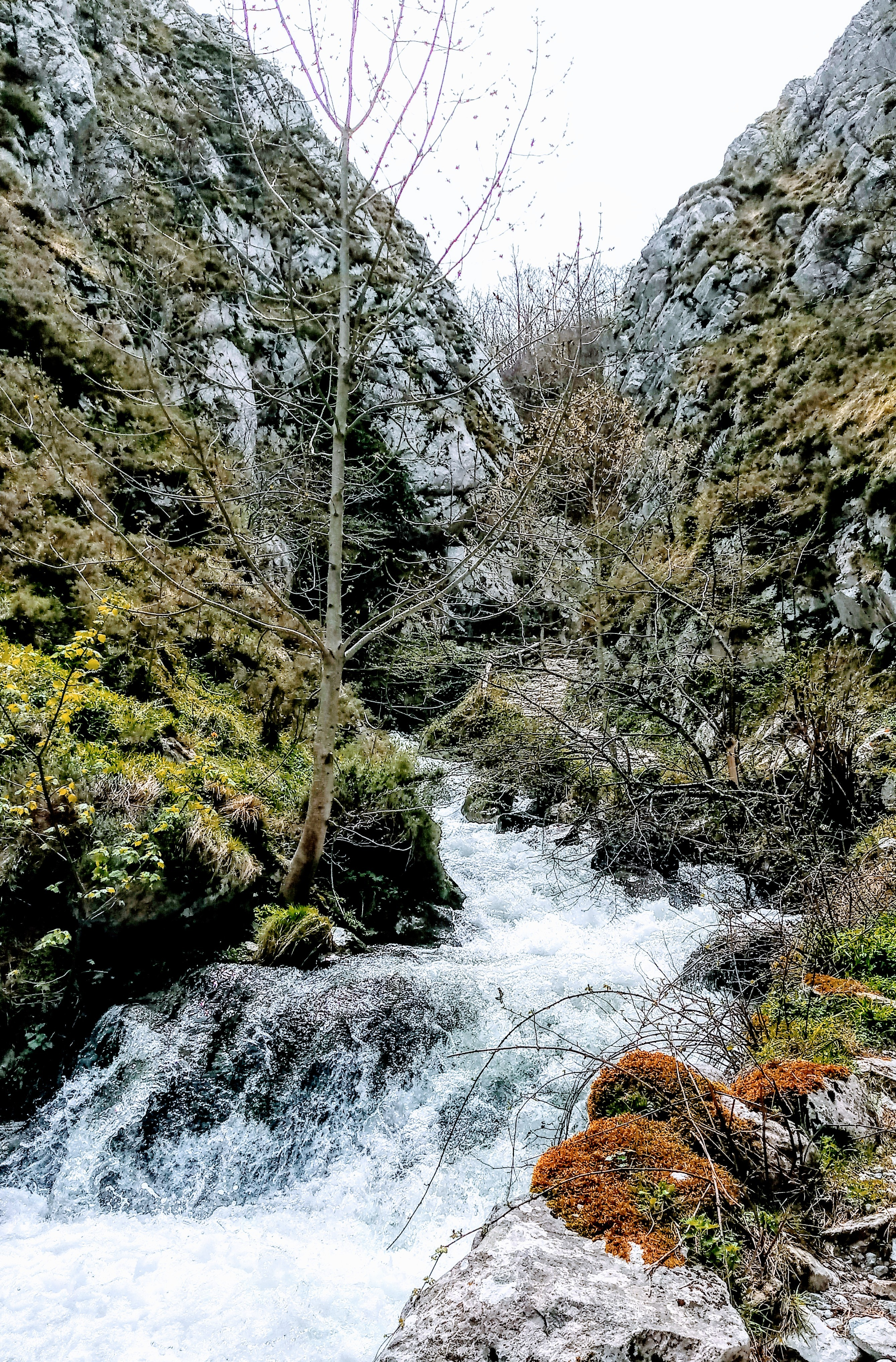 Foz del Río Pino This is a photography of a Site of Community Importance in Spain with the ID: ES1200037. Natura2000 entry, EEA entry